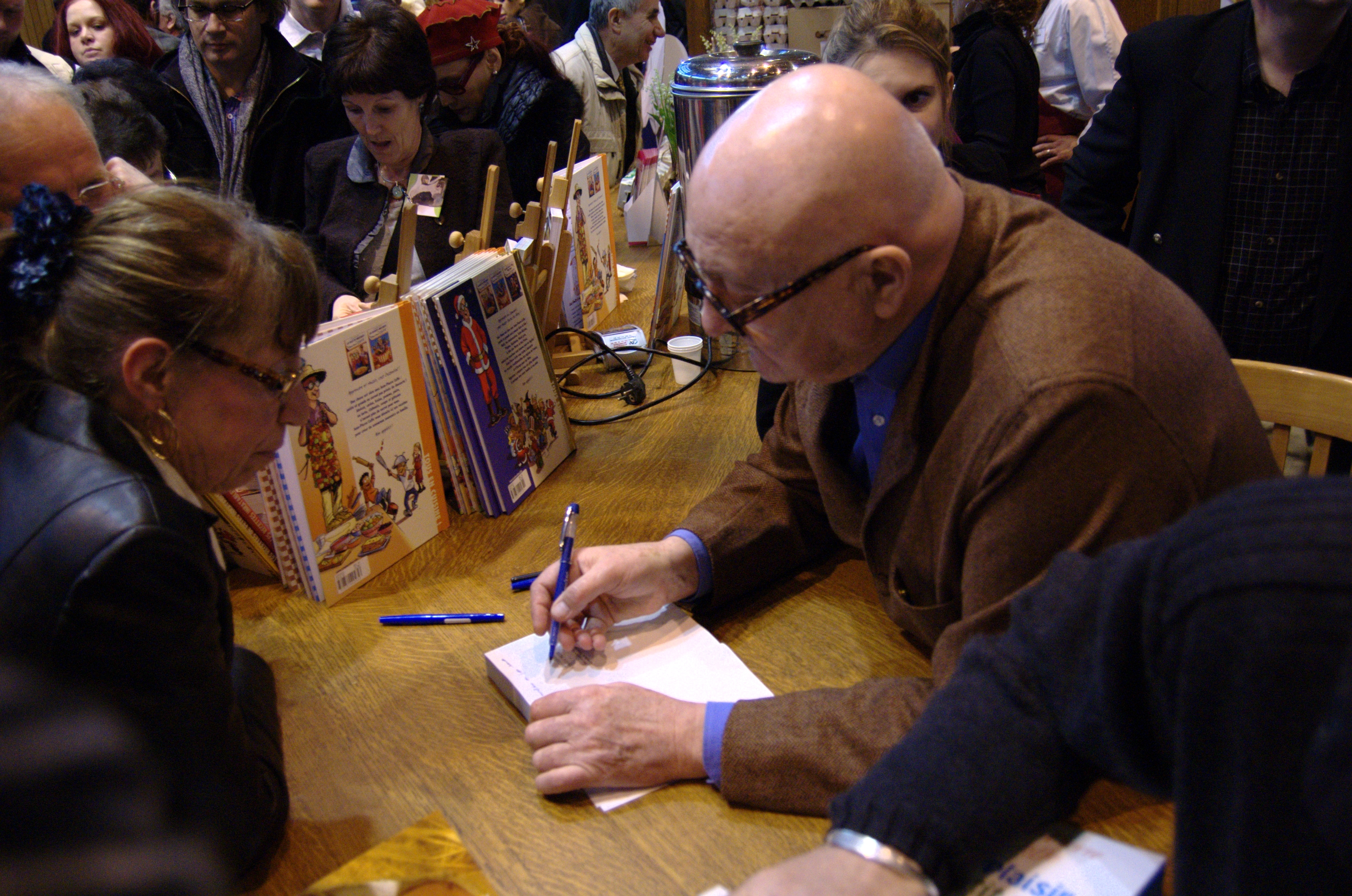 Jean-Pierre Coffe signant des autographes au Salon international de l'agriculture 2009 - Paris - France - 22 février 2009.